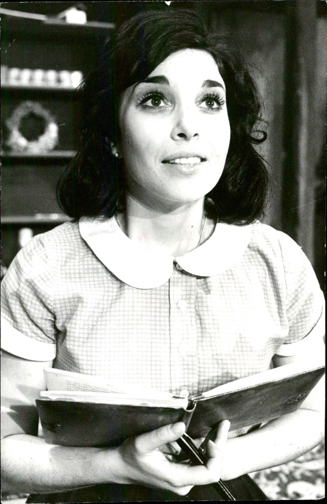 Pjäsfoto på Maude Adelson från "Anne Franks dagbok" på Dramaten. Införd i Svenska Dagbladet 1964-01-31 sid 14 (